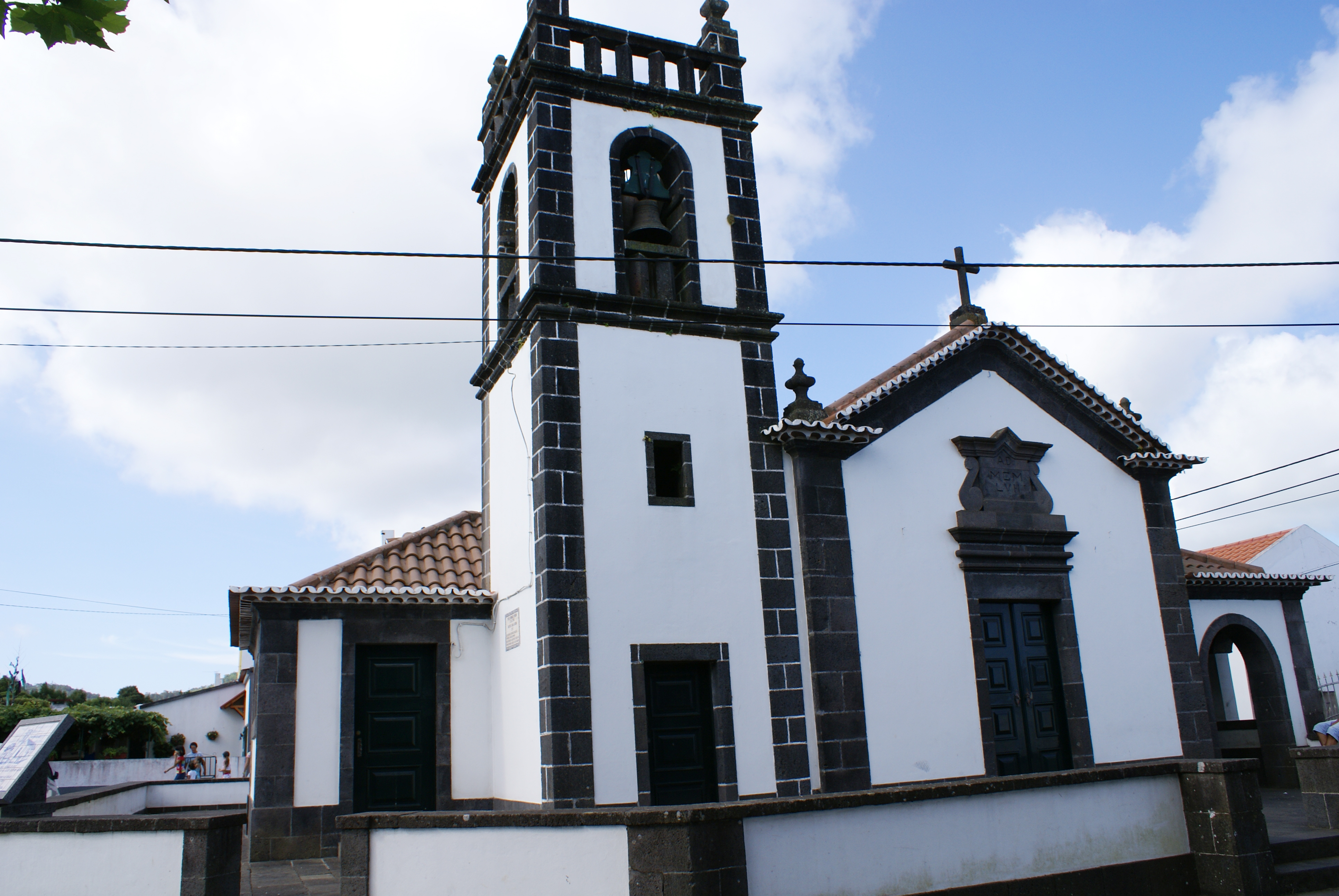 Igreja dos Aflitos, Fenais de Nossa da Luz, Ponta Delgada, ilha de São Miguel, Açores